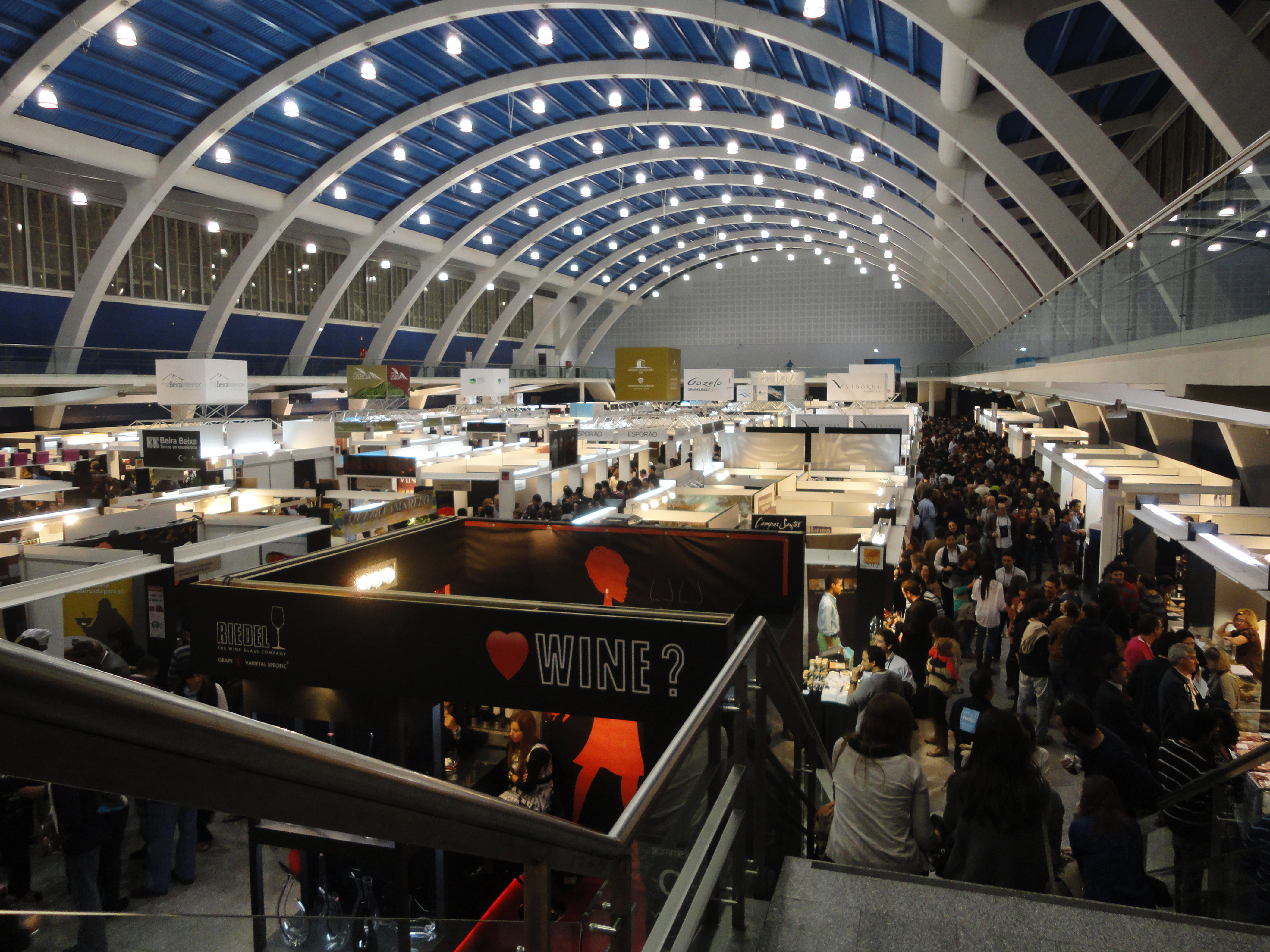 Feira das Indústrias de Lisboa, atual Centro de Congressos de Lisboa, Belém, 1952-57, Arq. Keil do Amaral